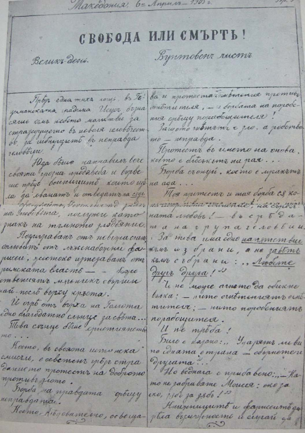 Брой на вестник "Свобода или смърт" на Пейо Яворов от 6 април 1903